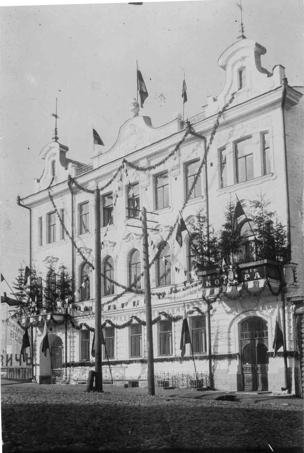 Королёвские номера в Перми